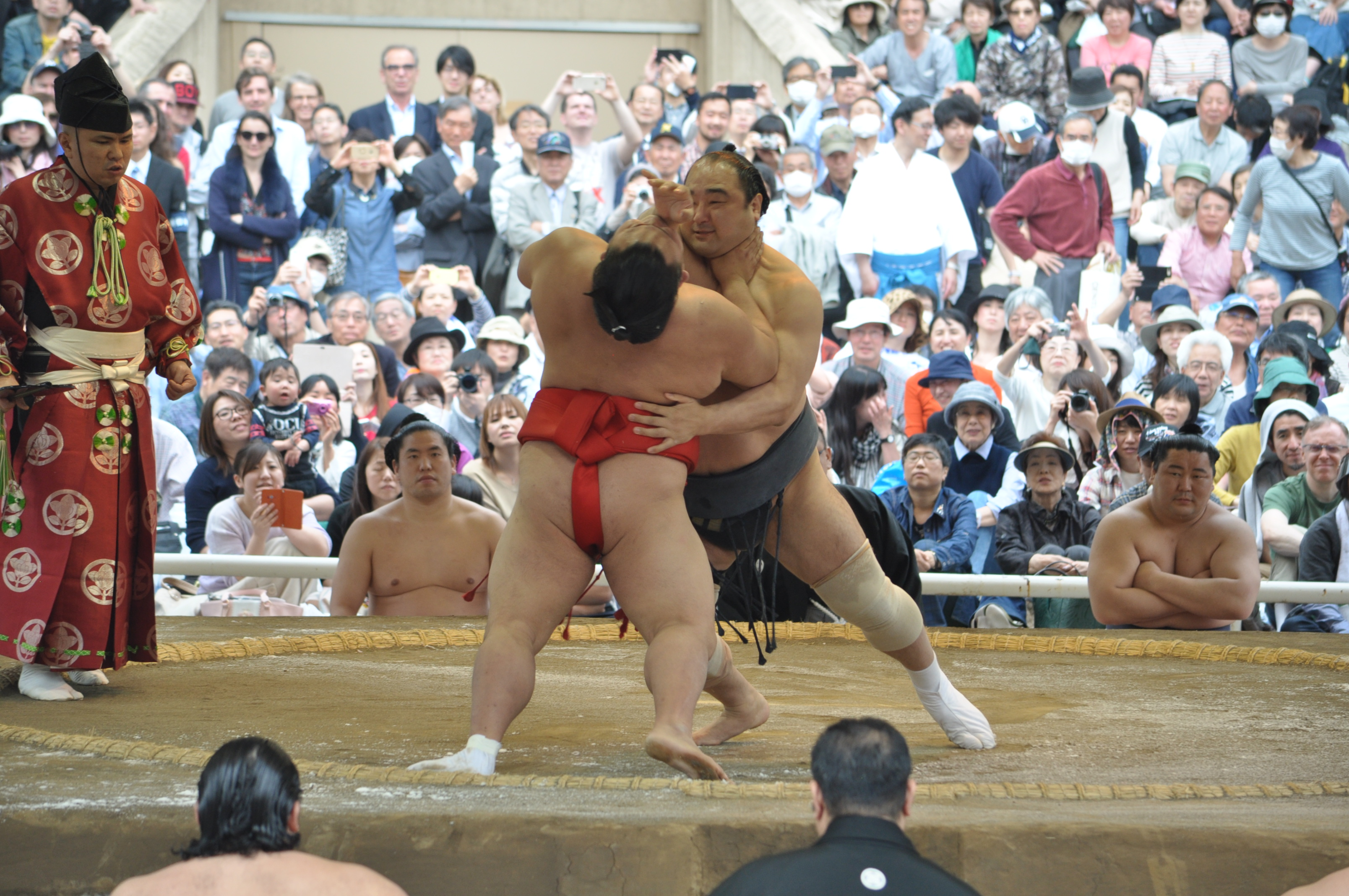 安美錦 竜児